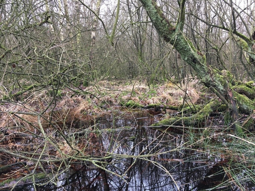 Foto berkenbroekbos in het Aamsveen